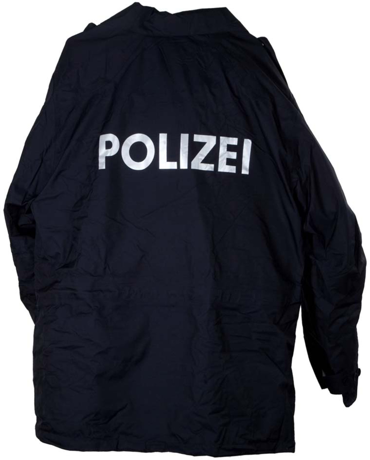 Oberbekleidungssorten der Bundespolizei und des rechtskundigen Dienstes bei den Sicherheitsbehörden Regenjacke (Rückenansicht)